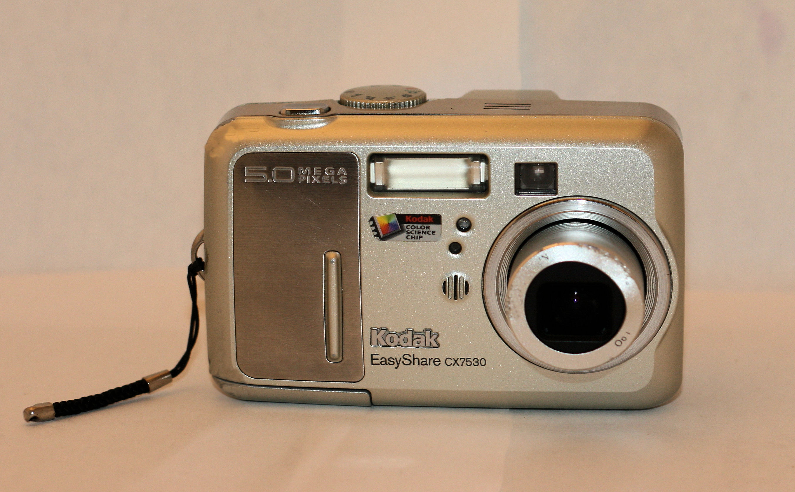 Kodak EasyShare CX7530 Camera